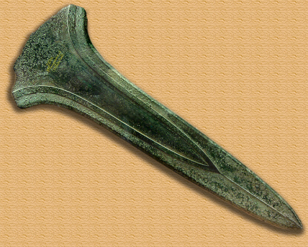 Epée, bronze, âge du bronze, vers 800 av. JC ???, musée des antiquités nationales, Saint-Germain-en-Laye